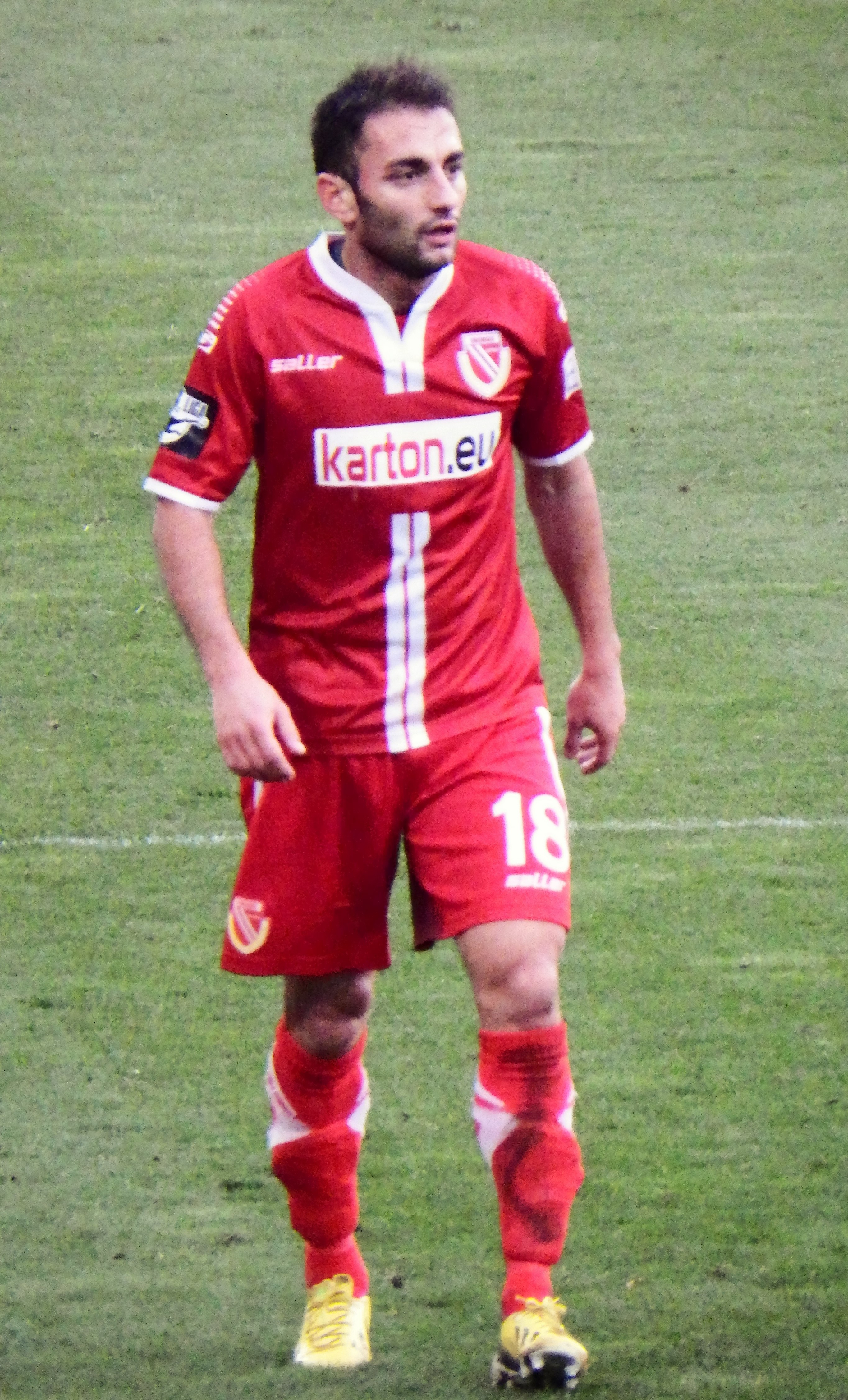 Makarenko, Anton Cottbus 14-15